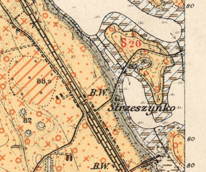 Stawy Strzeszyńskie na mapie z 1898 roku. Na górze fragment Jeziora Strzeszyńskiego. Przez środek biegnie linia kolejowa Poznań - Krzyż.